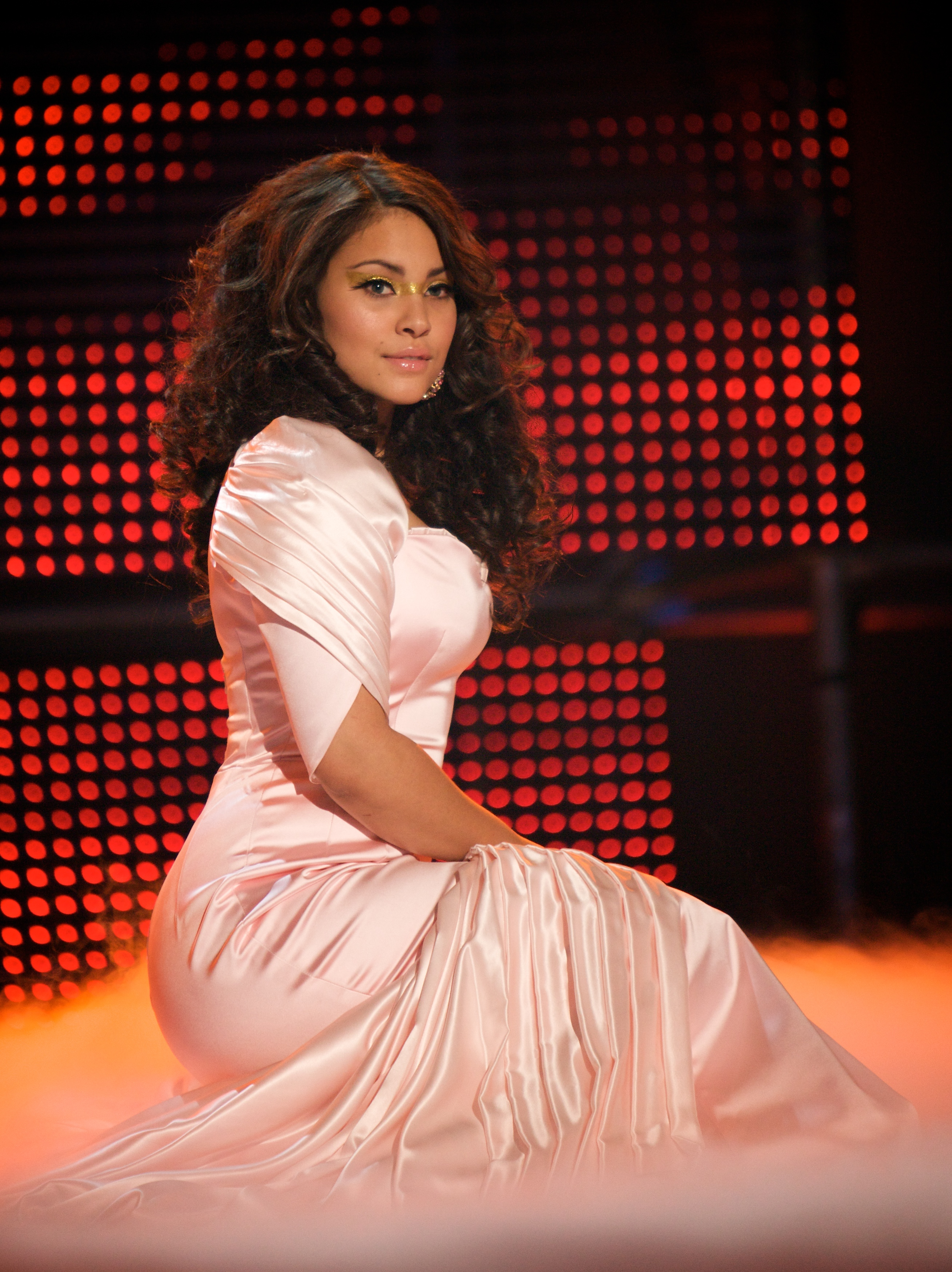 Mira Craig